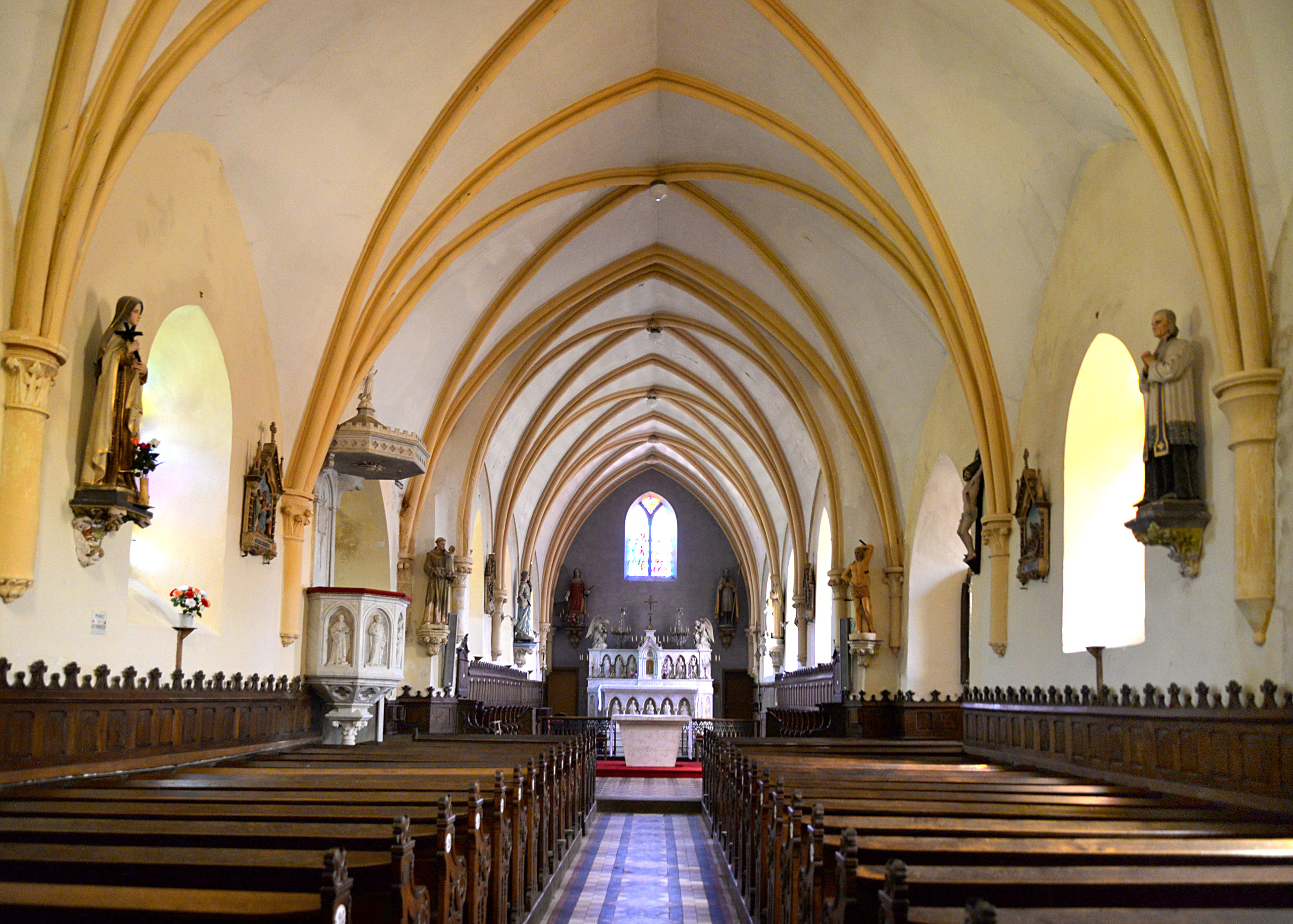 Le Mesnil-Rogues (Manche)